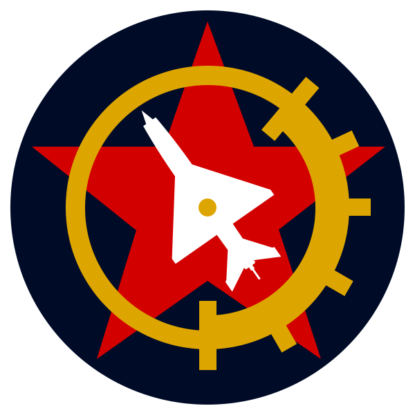 中華民國空軍第46中隊假想敵隊徽